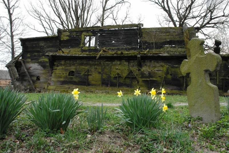 Száldobos